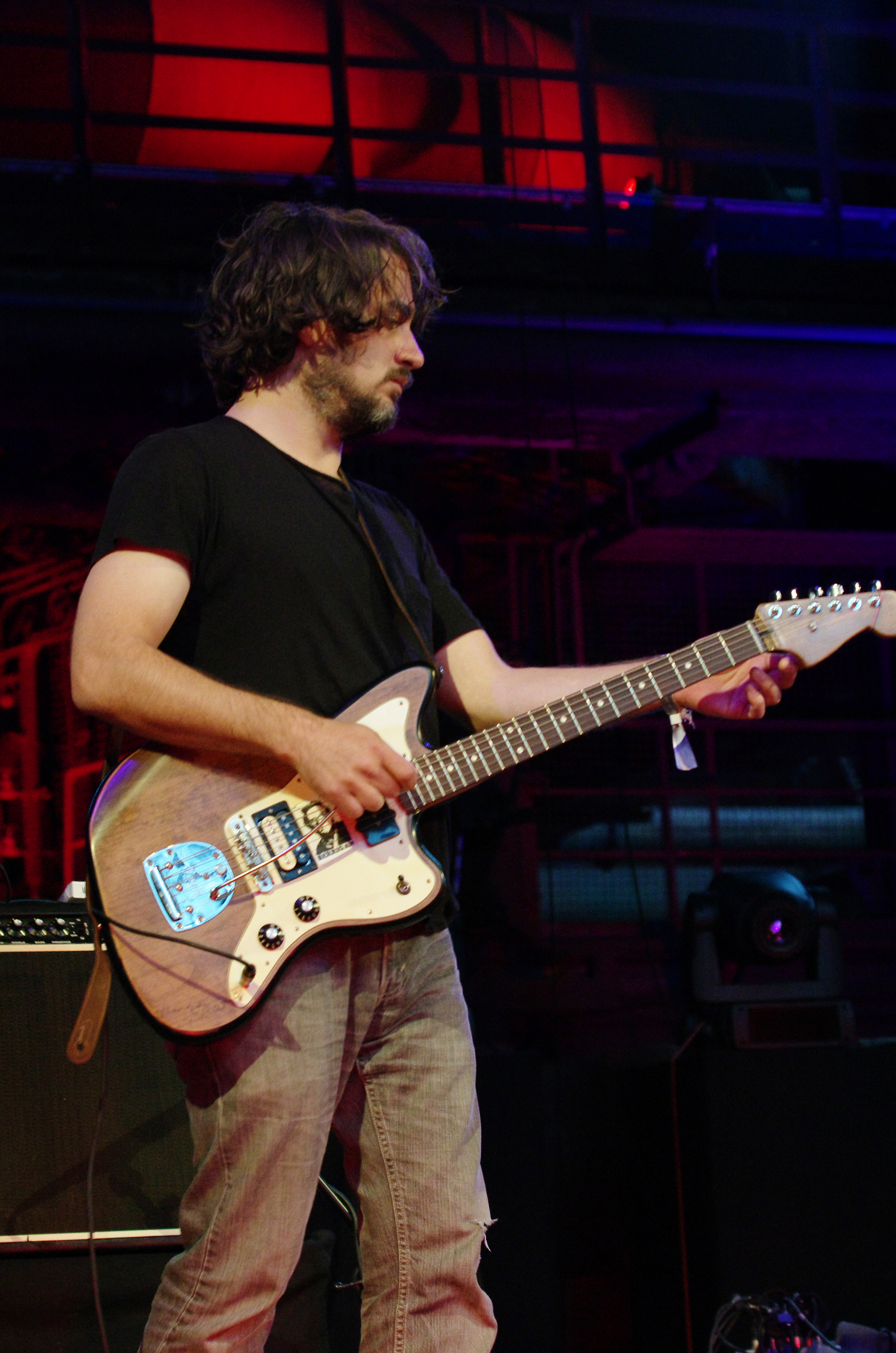 Chelsea Light Moving beim Traumzeit-Festival 2013 in Duisburg. Besetzung: Samara Lubelski (bass), John Moloney (dr), Thurston Moore (voc, git), Keith Wood (git)